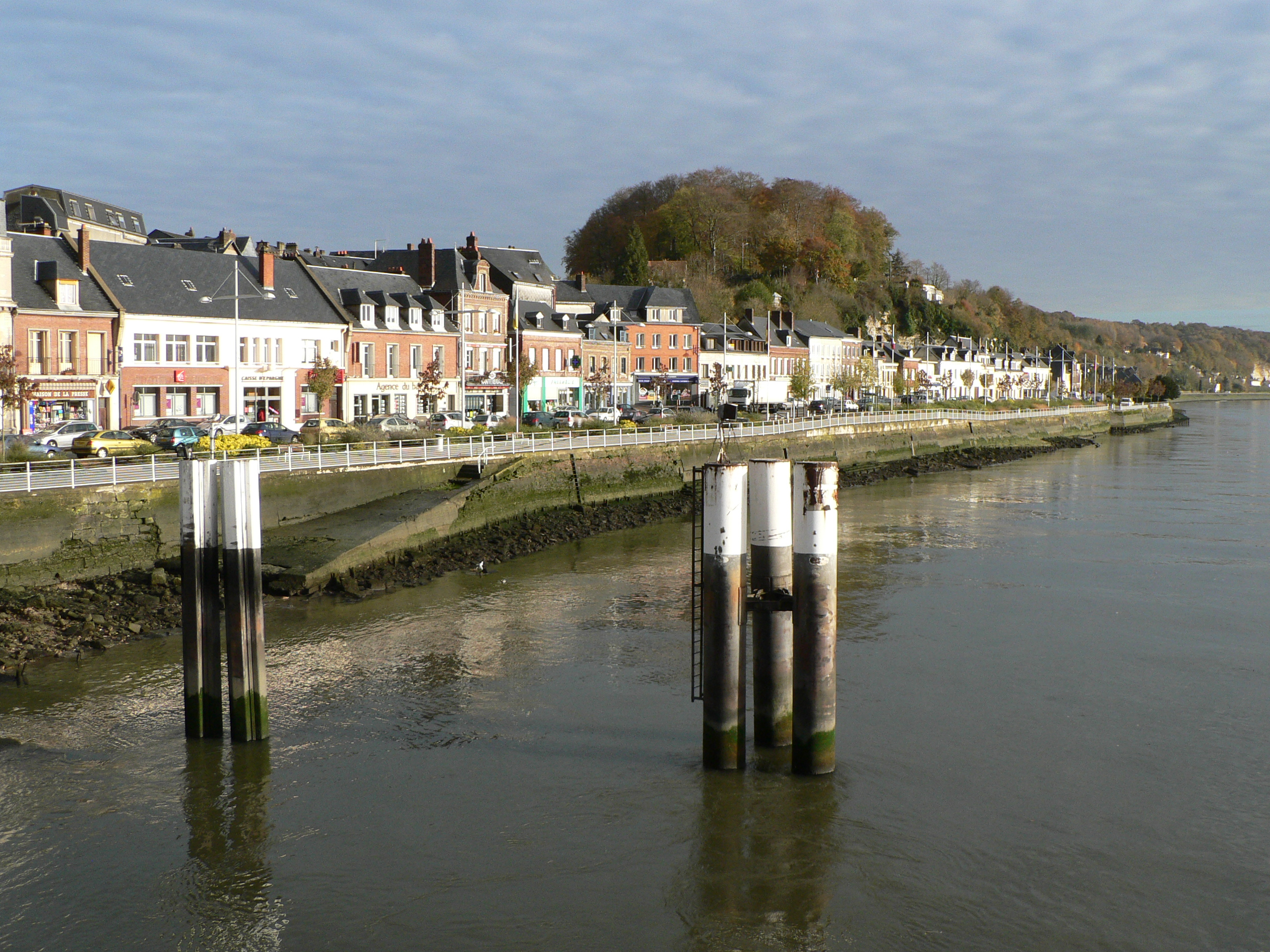 Quais de Seine à Duclair